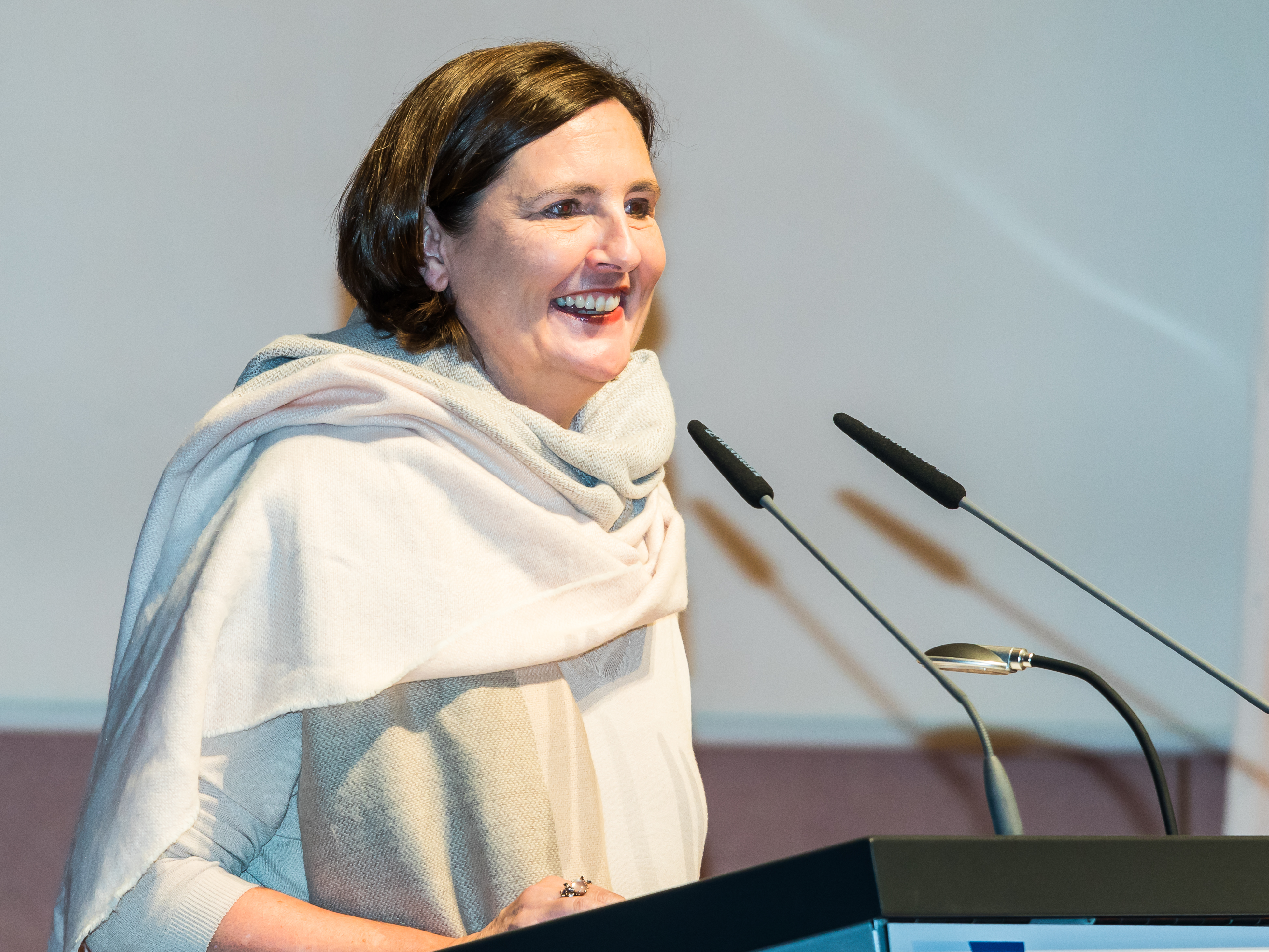 Eröffnung der Sonderausstellung „KÖLN 1968! Protest. Pop. Provokation“ des Kölnischen Stadtmuseums. Veranstaltungsort: Börsensaal der IHK Köln Foto: Grußwort durch Prof. Dr. Manuela Günter, Prorektorin für Gleichstellung und Diversität, Universität zu Köln